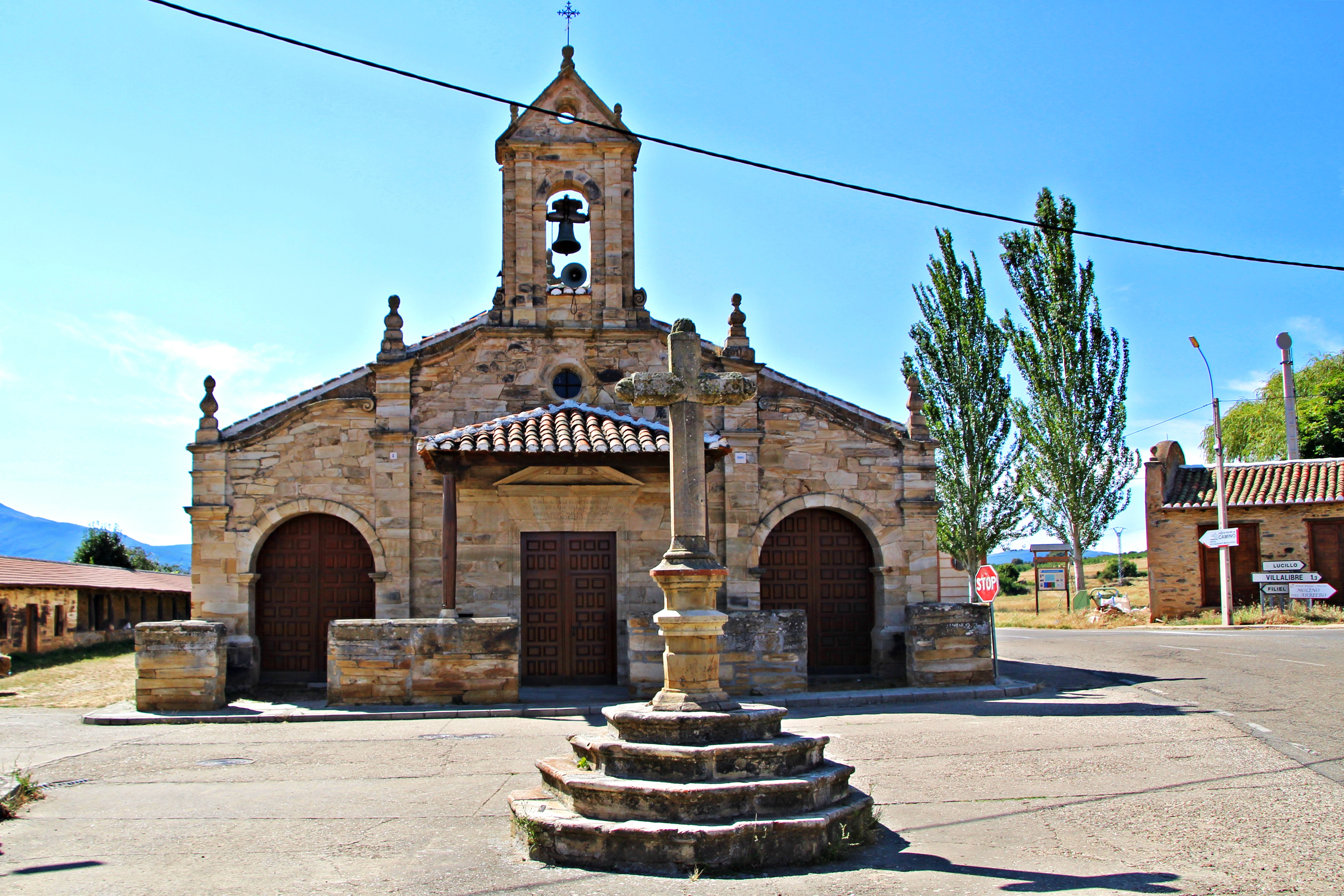 Luyego, La Maragatería en la provincia de León.